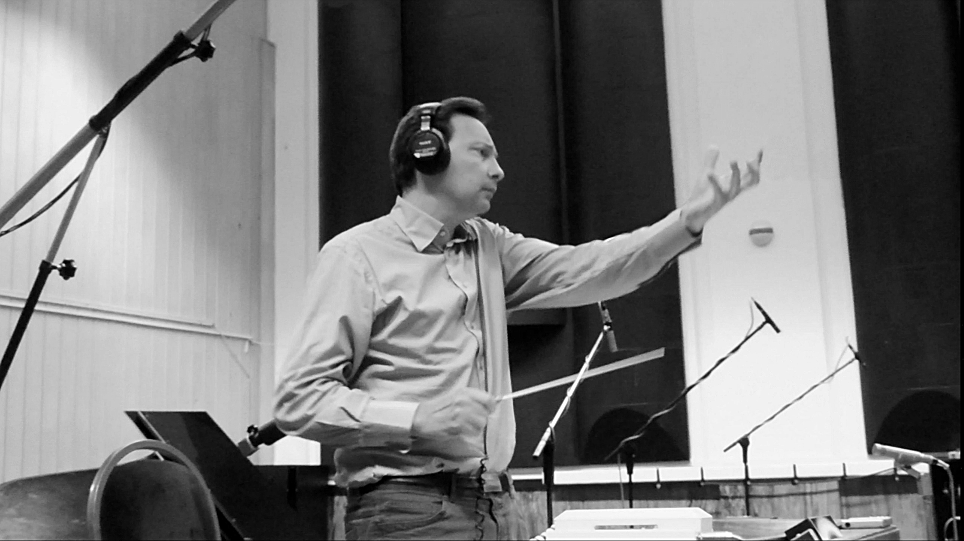 Thierry Malet dirige The City of Prague Philharmonic Orchestra dans les studio Smecky (Prague)